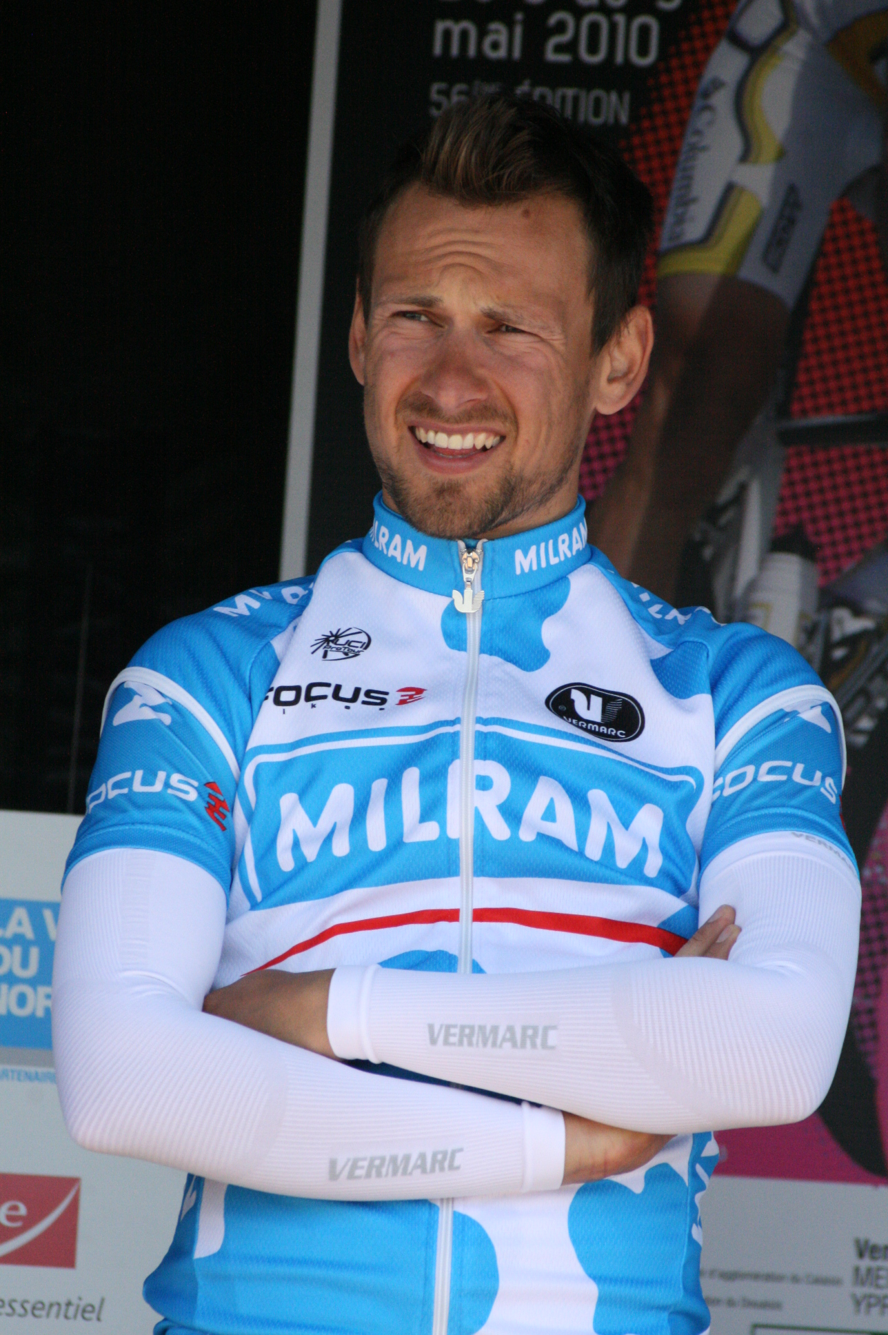 Björn Schröder, lors de la présentation des équipes des 4 jours de Dunkerque 2010